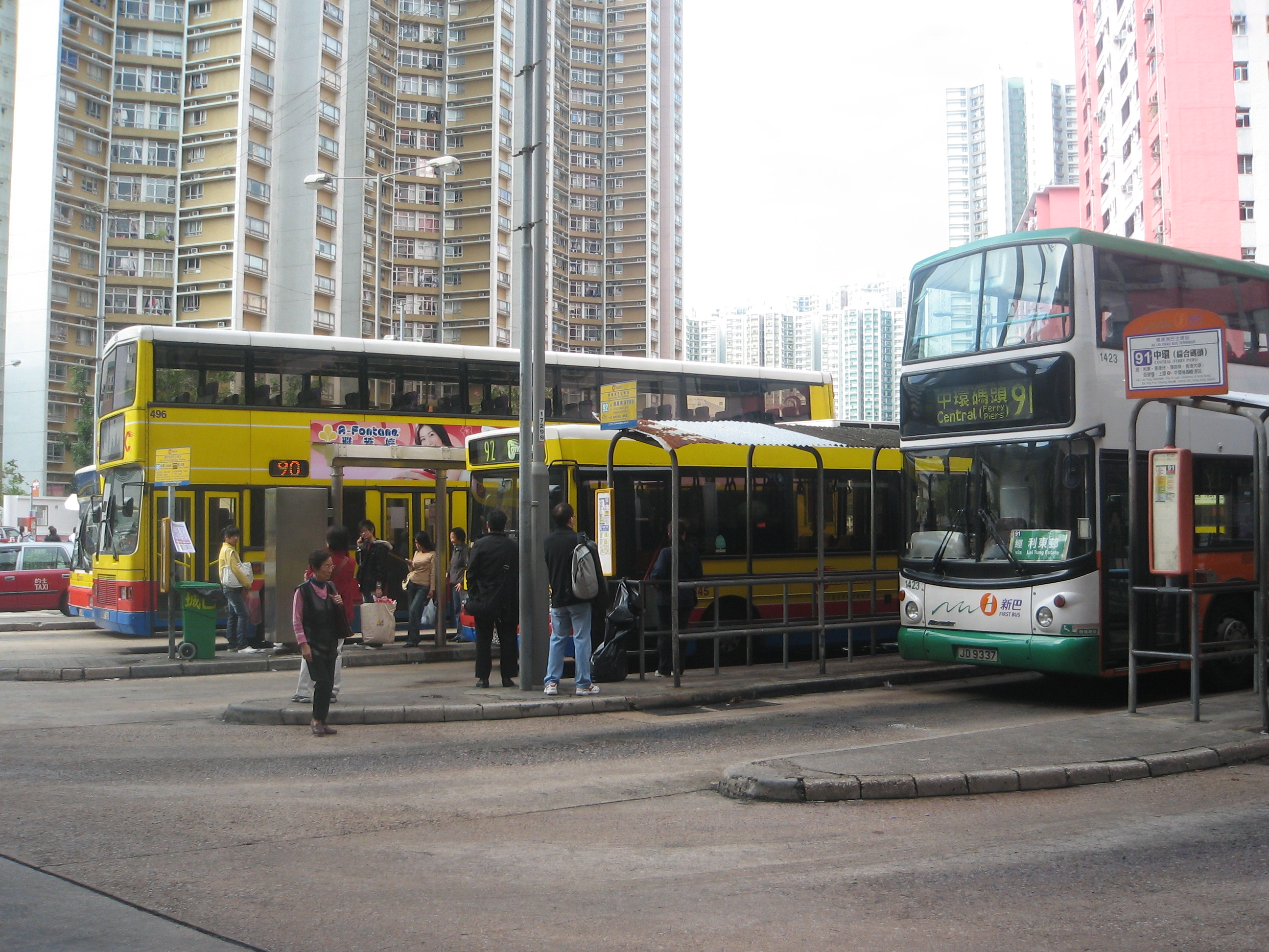 中文（香港）: 鴨脷洲邨巴士總站。